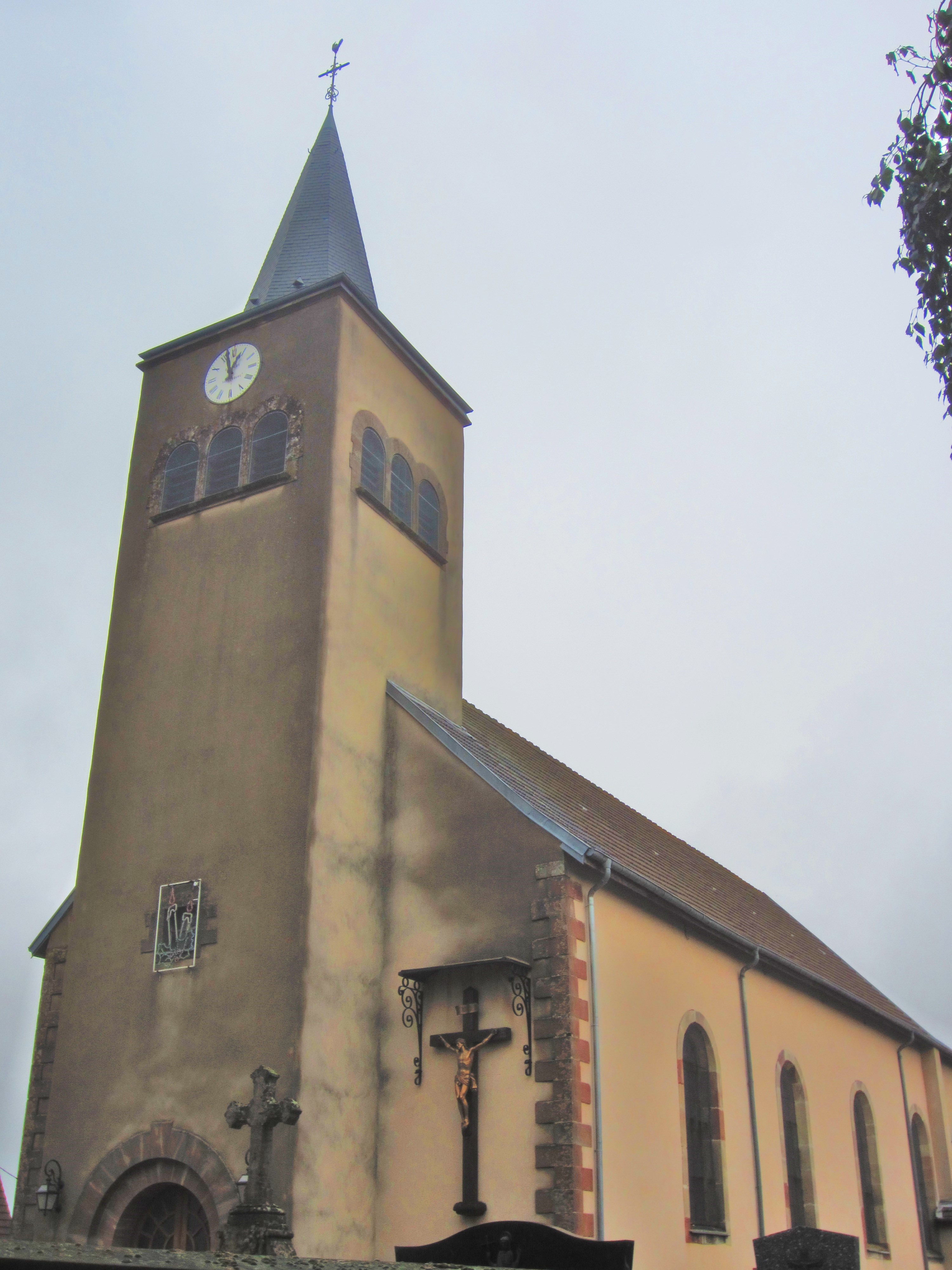 Eglise Loudrefing